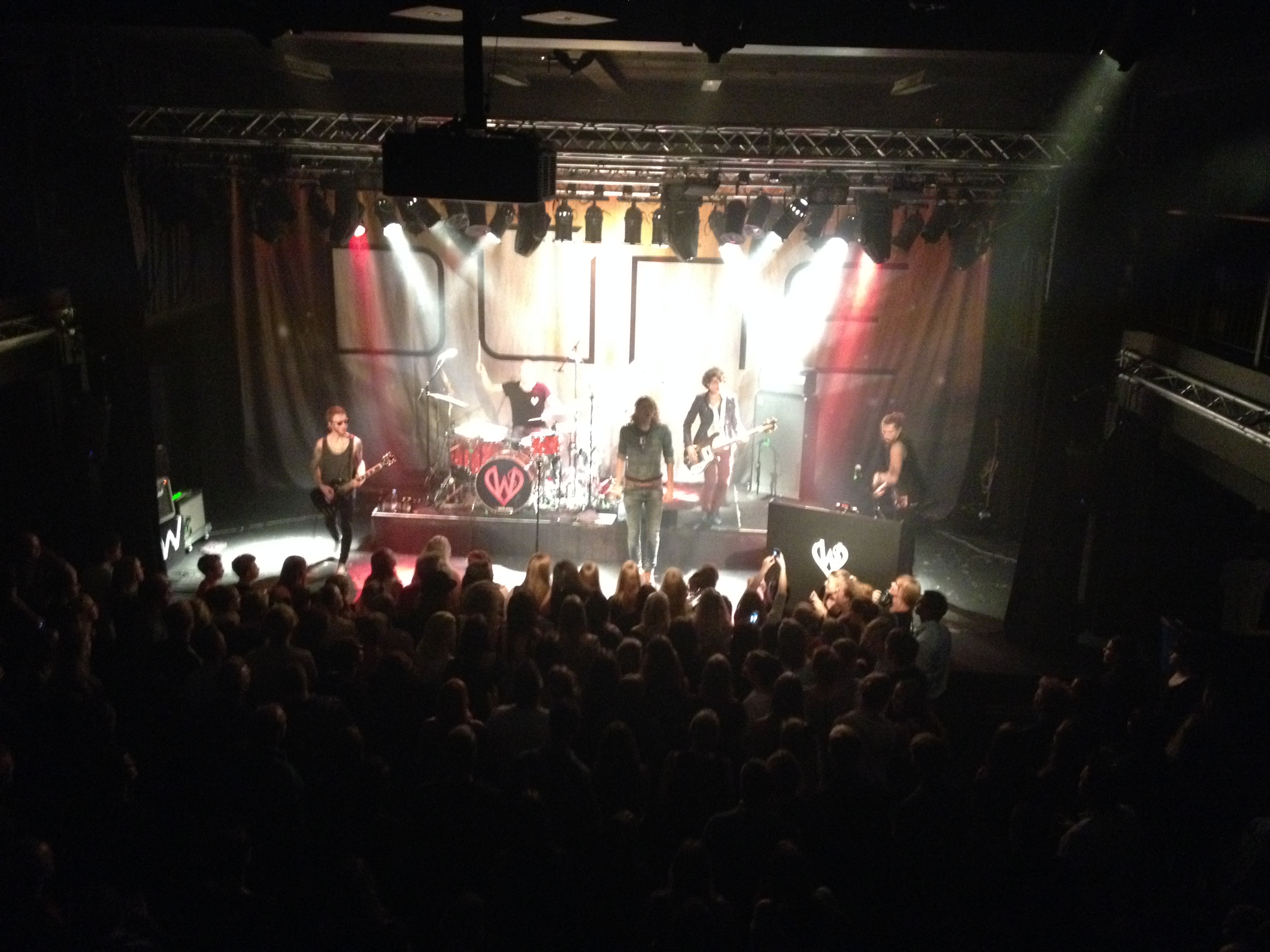 Dúné under deres Wild Hearts Tour koncert på Fermaten i Herning.